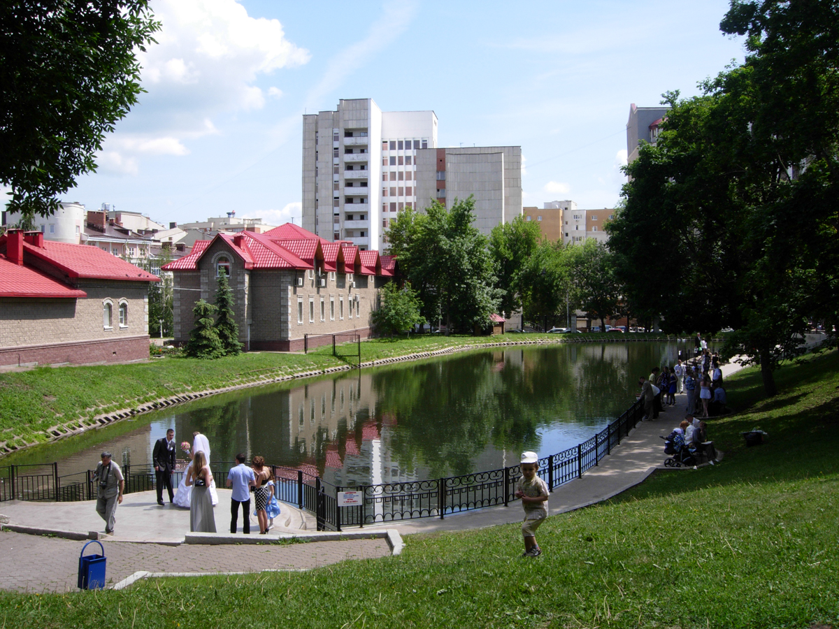 Озеро в саду Аксакова